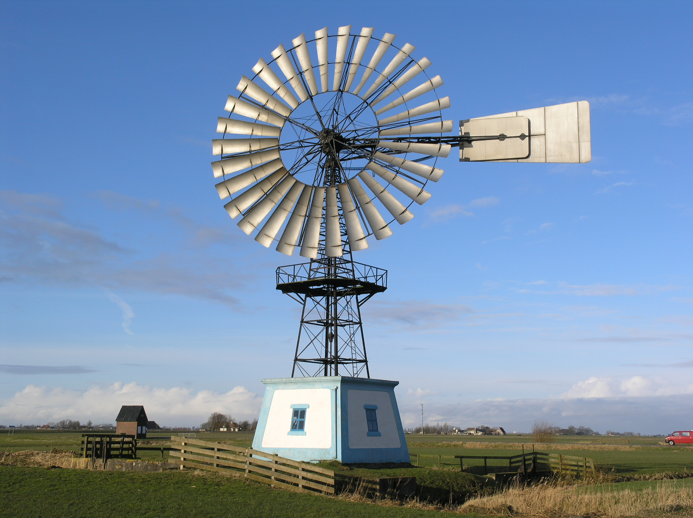 Lutkewierum Windmotor Poldermolen